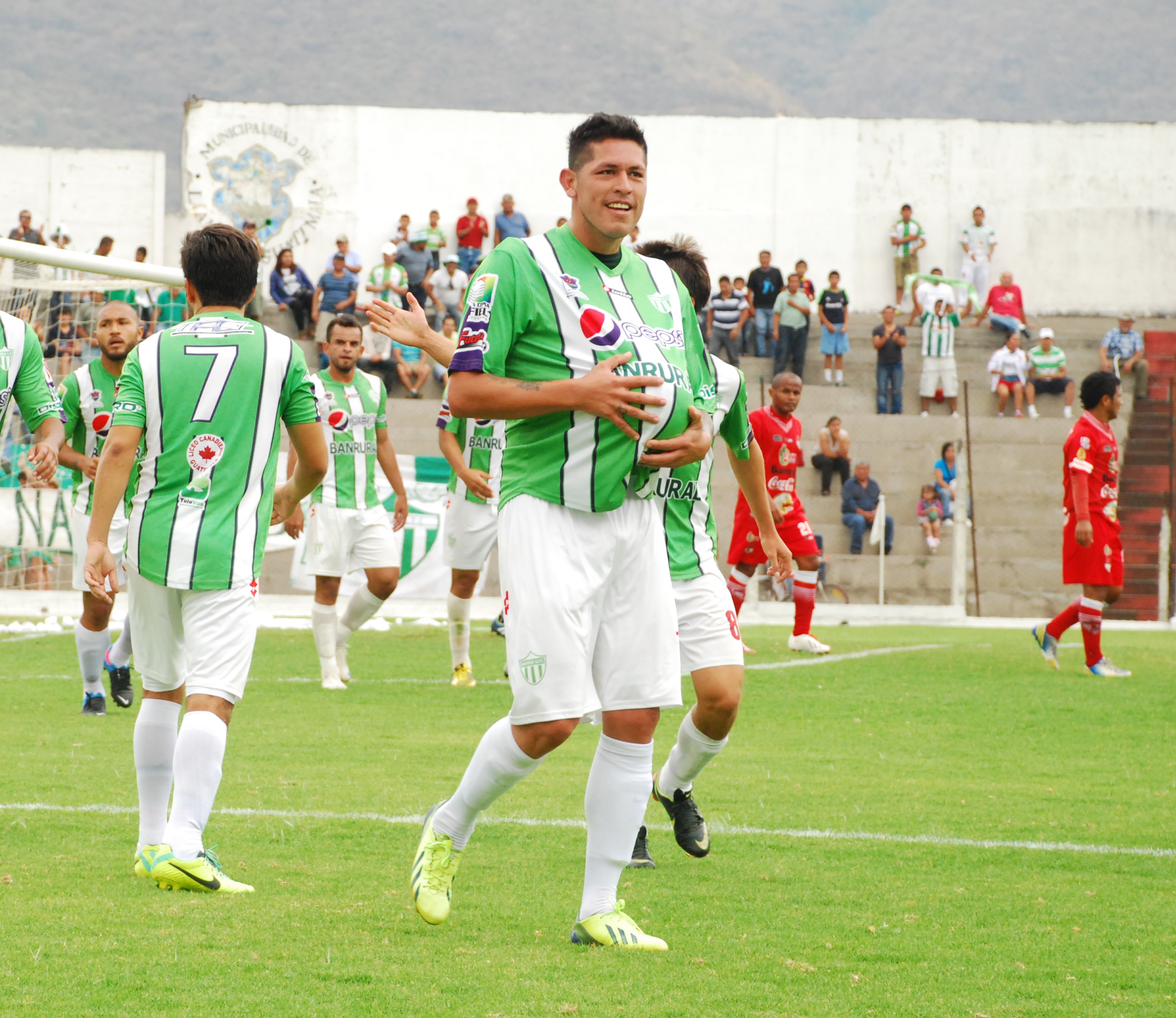 Paulo Centurión en Antigua GFC festejando su gol con dedicatorias a su Esposa quienes esperan un Bebe